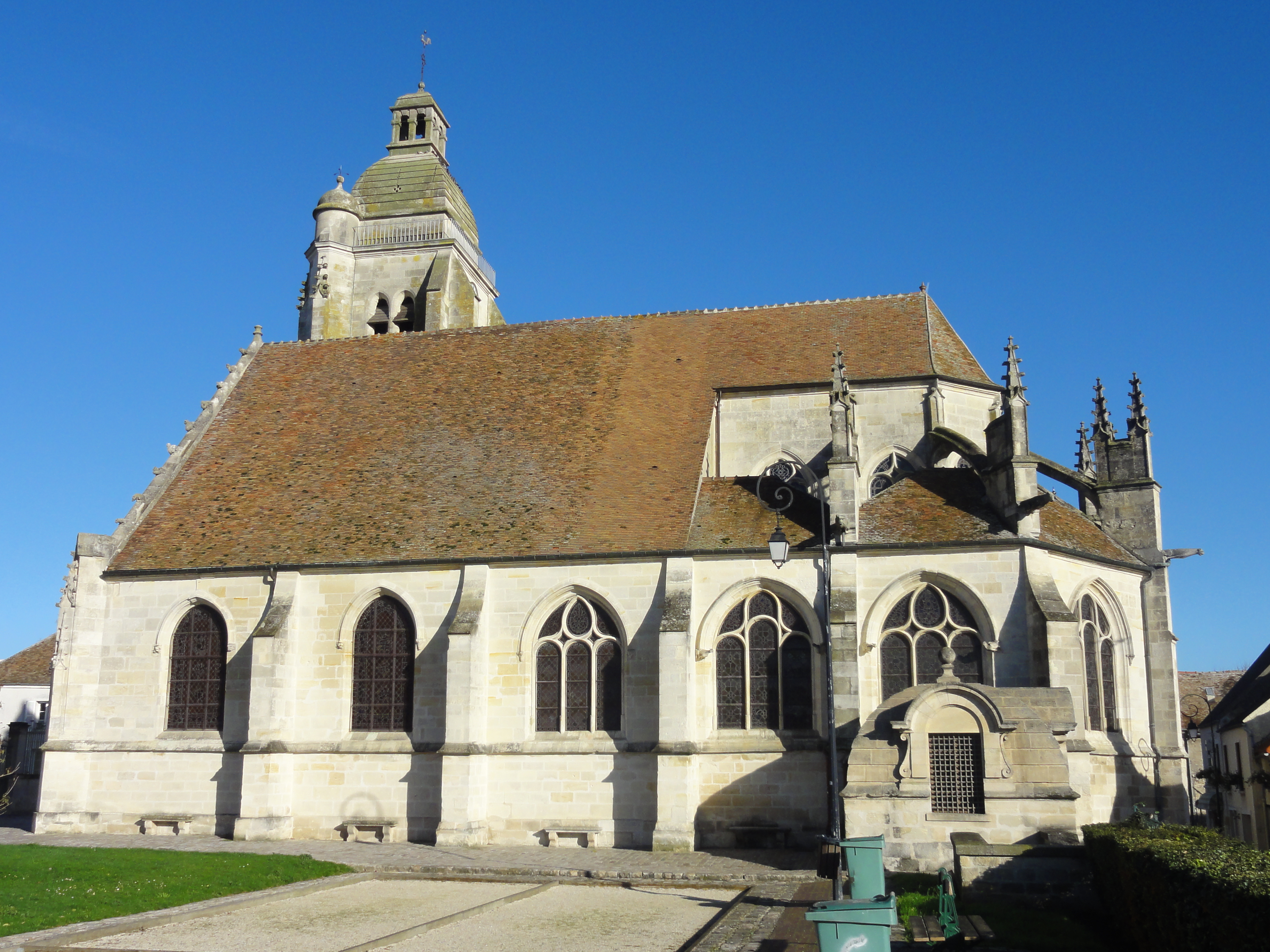 Église Saint-Martin du Mesnil-Amelot - voir titre.